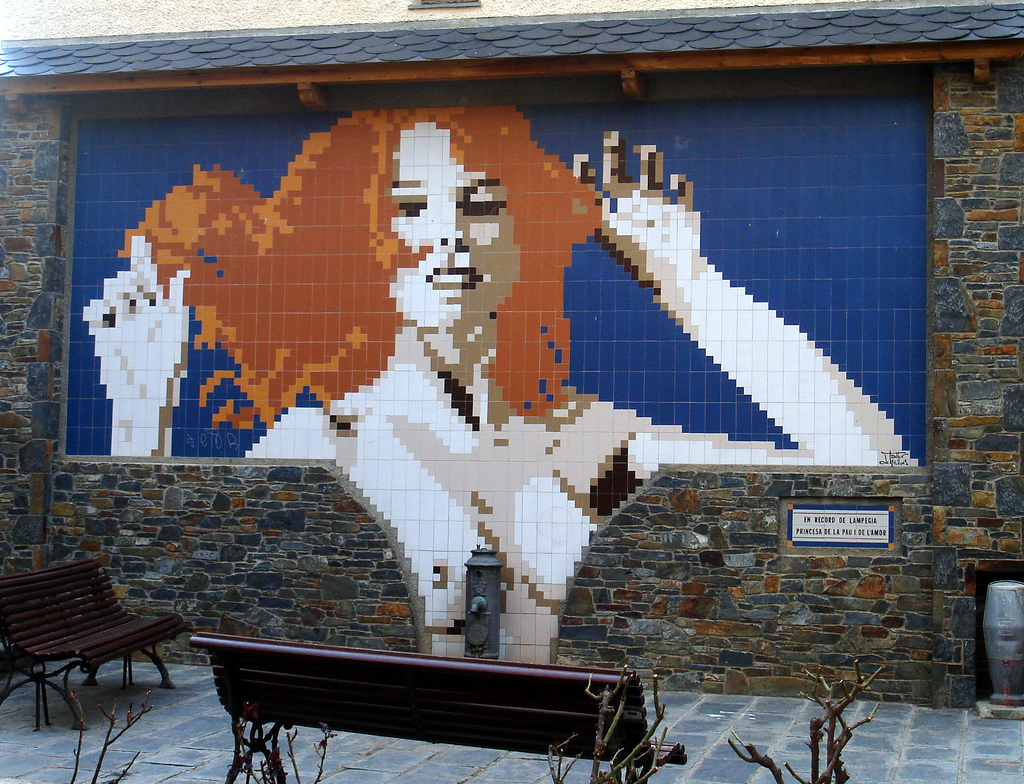 Plaça de Llívia, a la Cerdanya